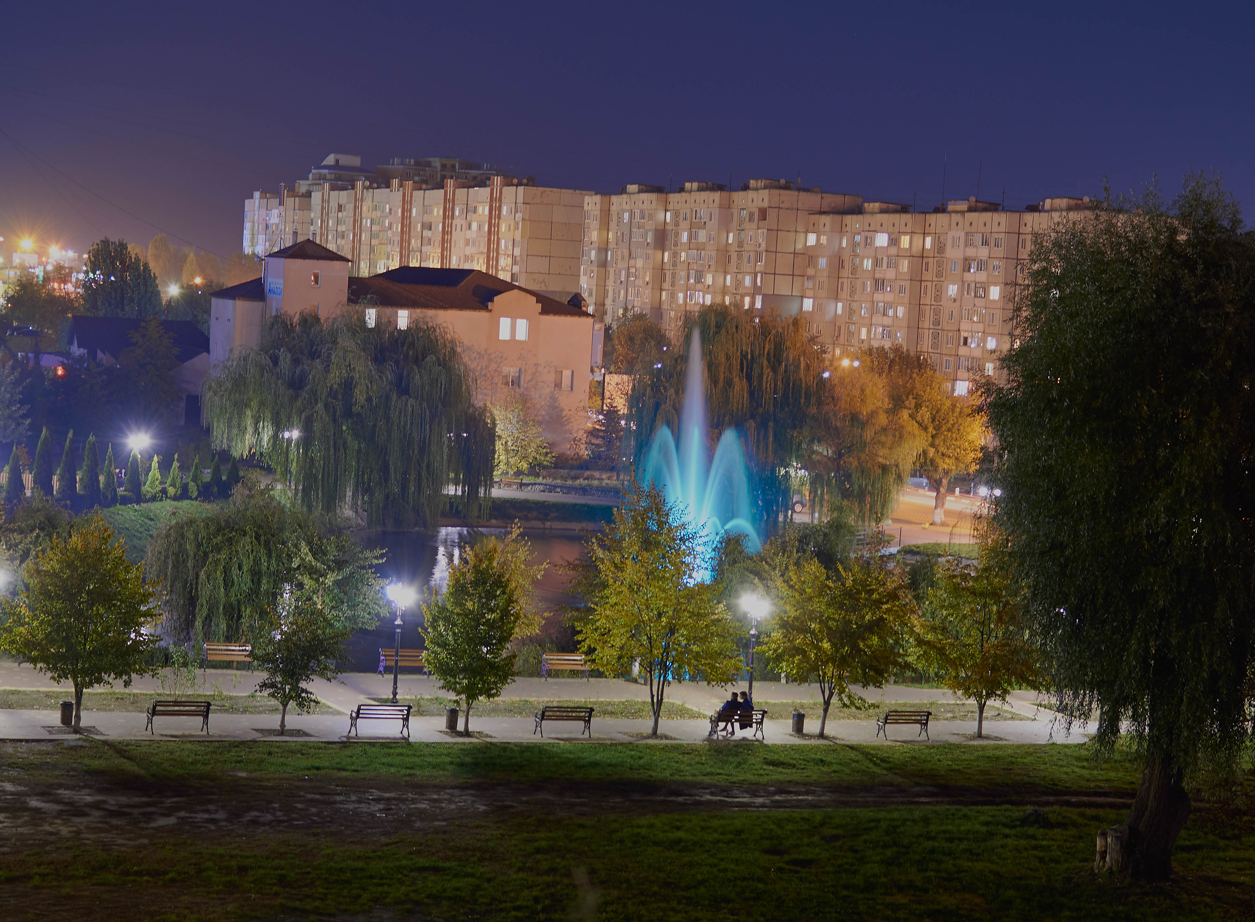 м. Обухів